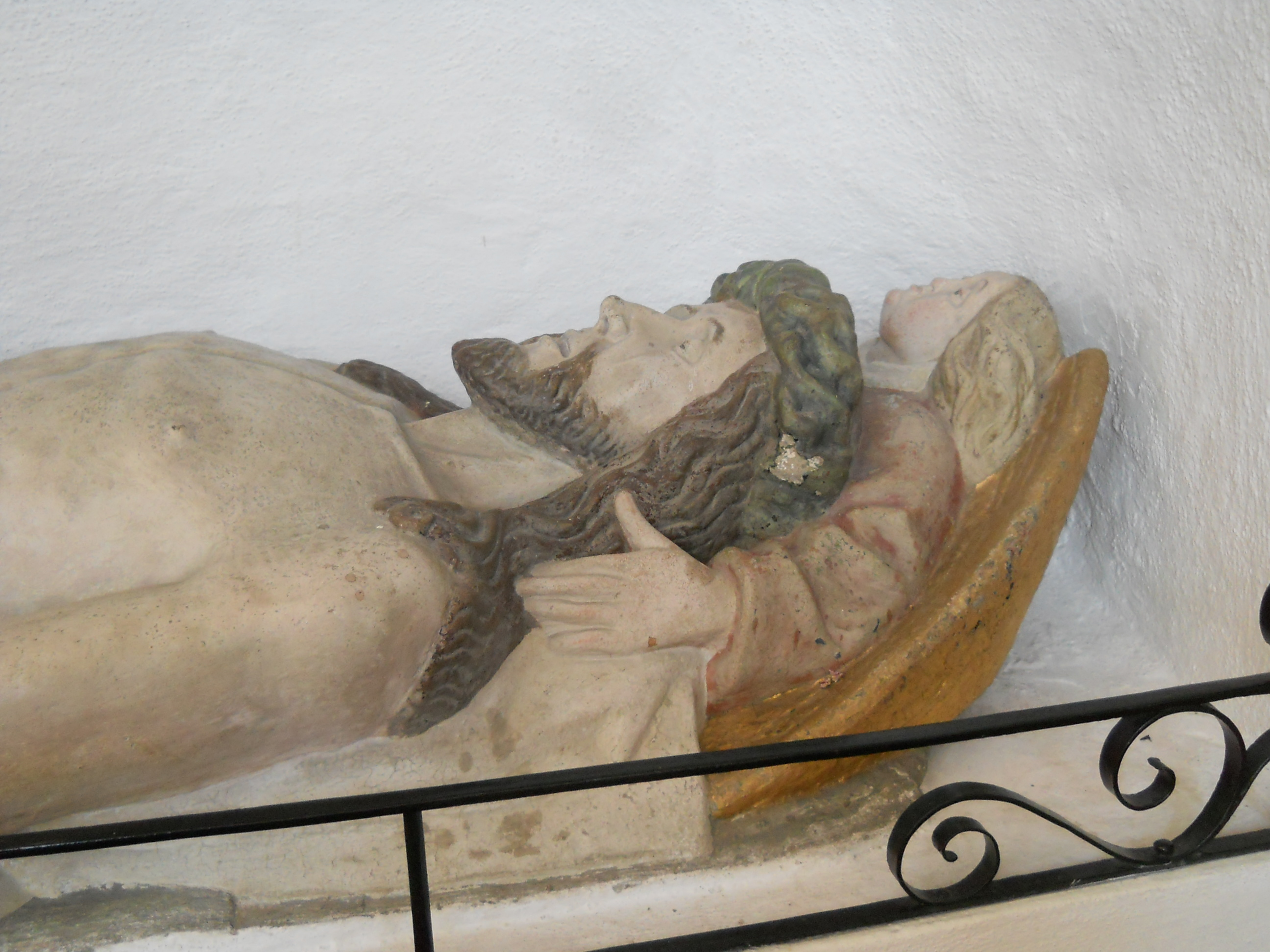 Rauenzell, Ortsteil von Herrieden im Landkreis Ansbach (Bayern), Kath. Pfarrkirche Mariä Heimsuchung, Christus im Grab aus der ehem. Wallfahrtskirche St. Salvator (Detail)